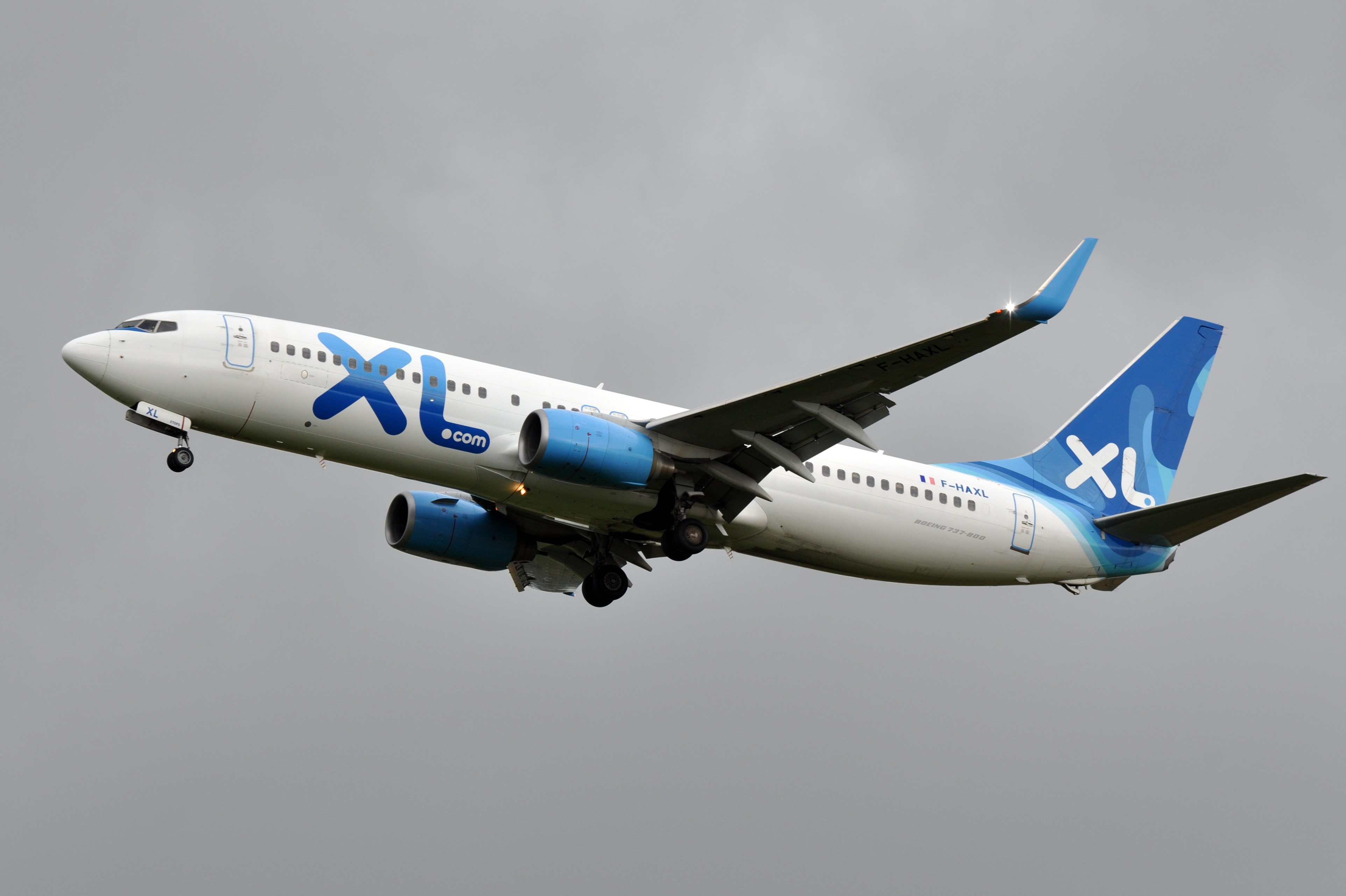 MSN 35279 LN 2626 B737-8Q8 XL AIRWAYS FRANCE CDG EX XL AIRWAYS AS F-HDXL / XL AIRWAYS AS G-XLFR